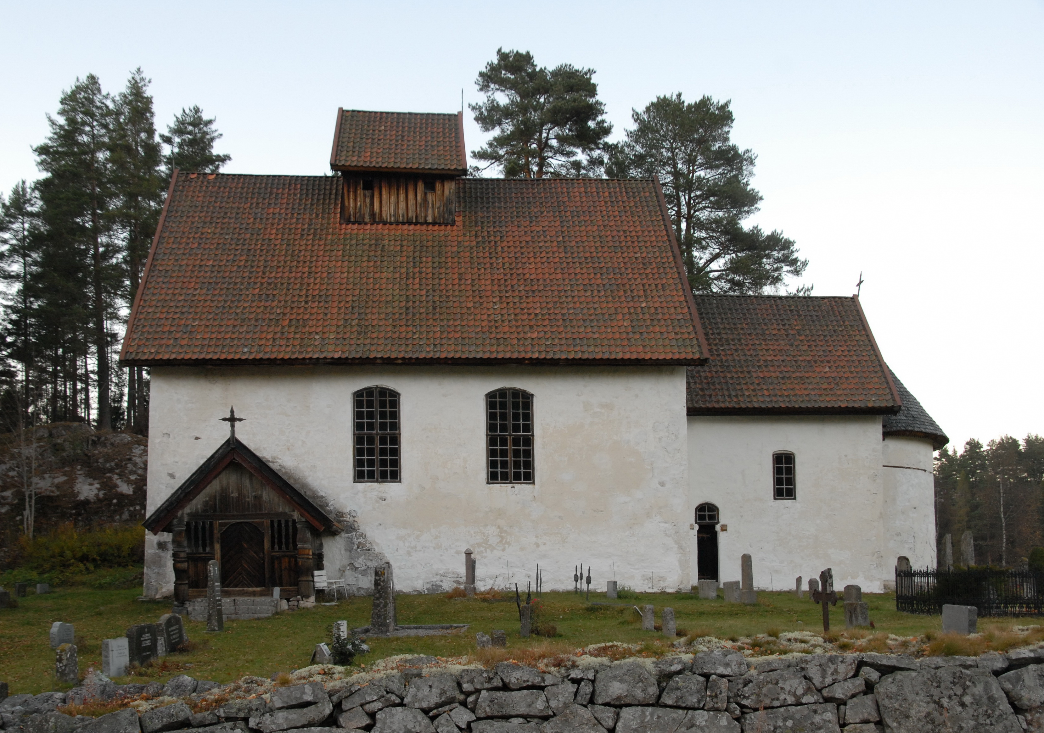 Kviteseid gamle kyrkje